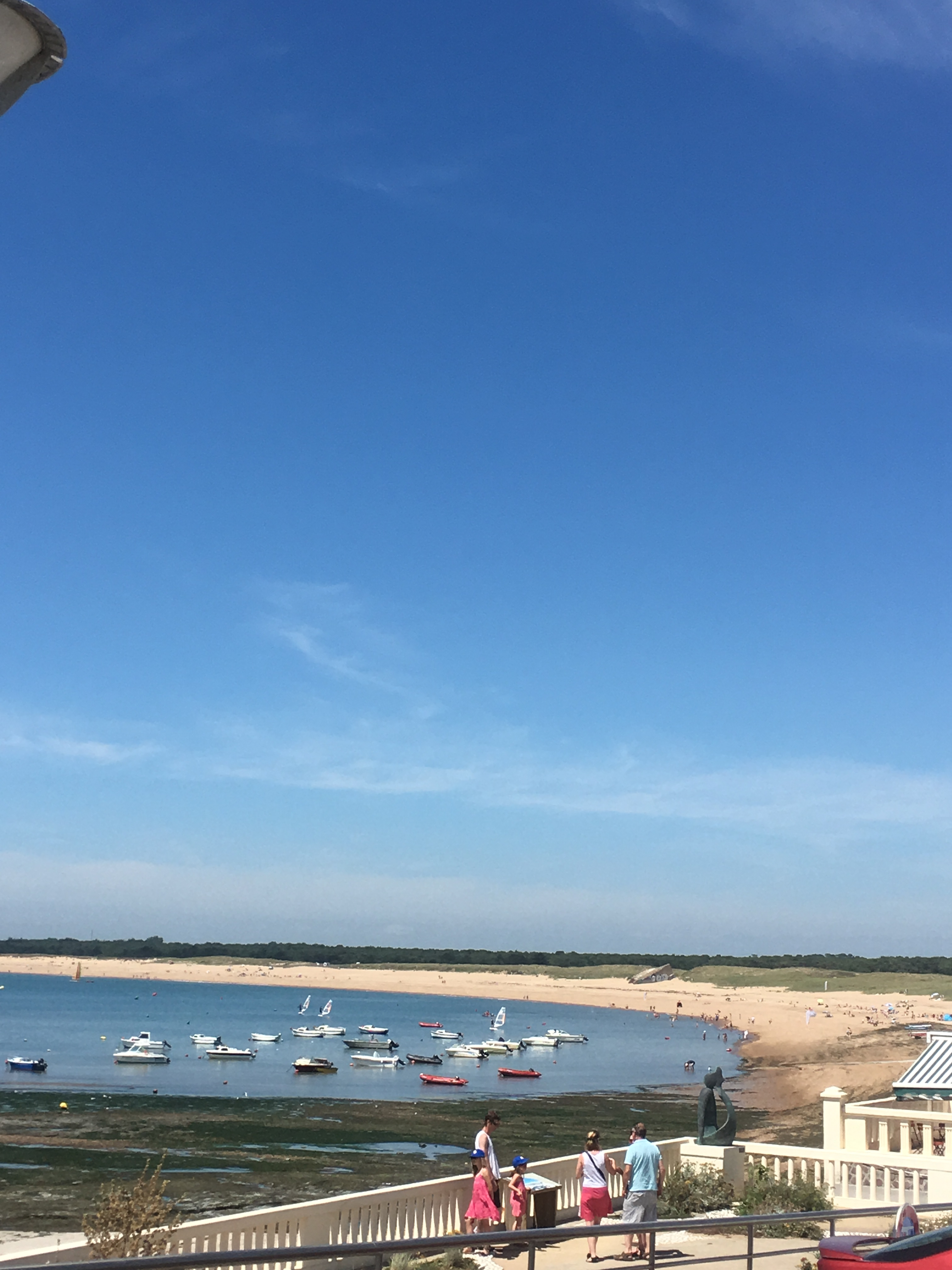 baie de sion sur l'ocean 85270